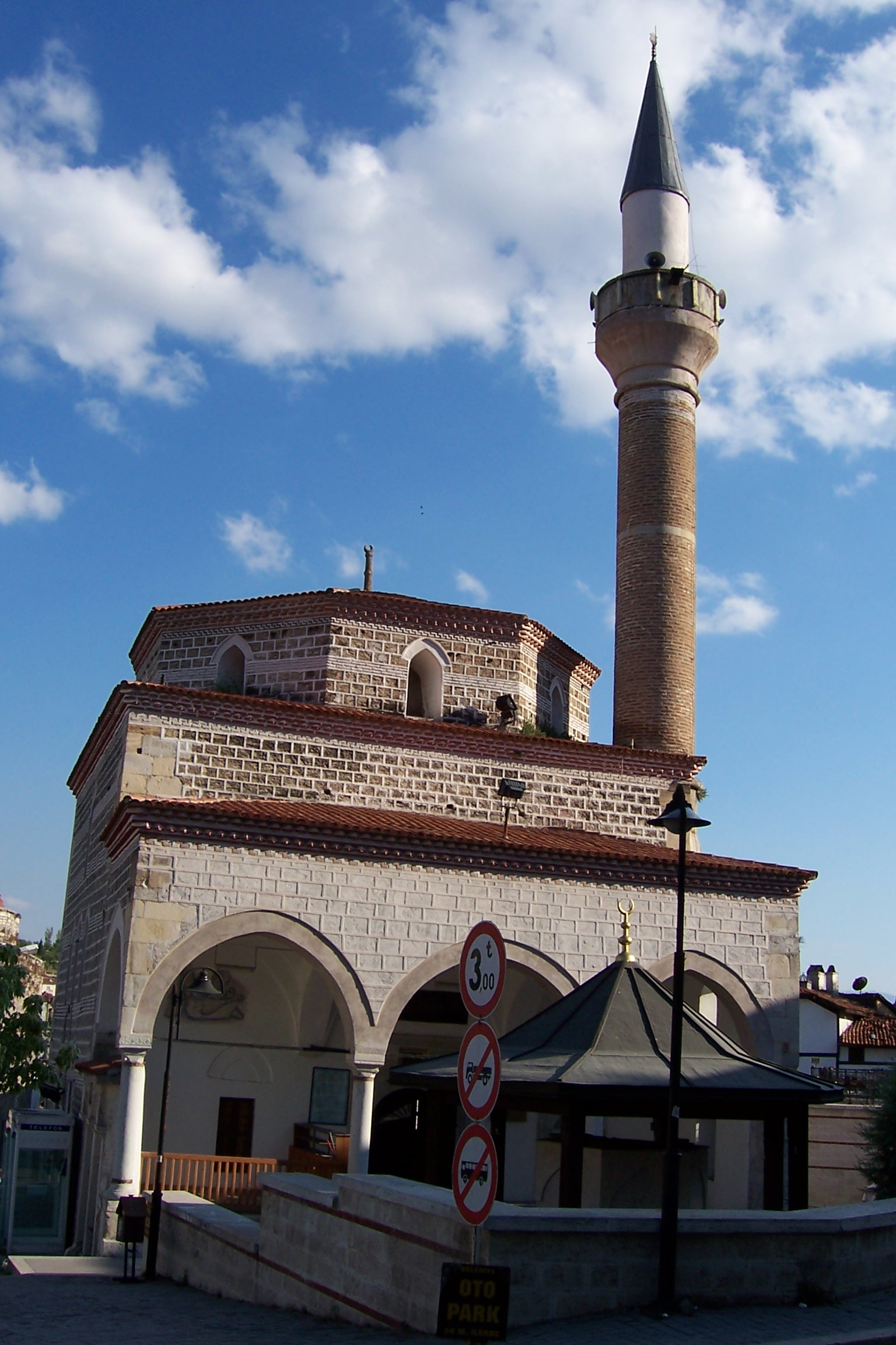 Kazdağlı Camii, Safranbolu, Karabük, Turkey